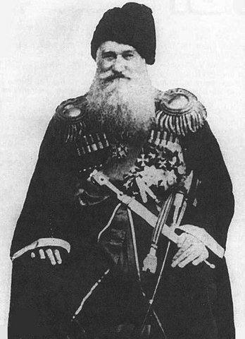 Арцу Чермоев (1825—1895) — российский генерал-майор, участник войн на Кавказе в 1842—1878 годах.